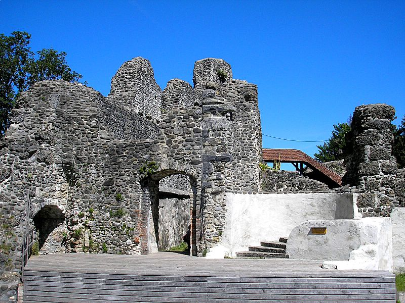 Burg Alttrauchburg (Markt Weitnau, Landkreis Oberallgäu, Bayerisch-Schwaben). Hauptburg, Innenraum. Eigene Aufnahme, Juli 2007 / Alttrauchburg castle near Weitnau (Bavaria, Germany). Central castle, interior. Own photo, July 2007